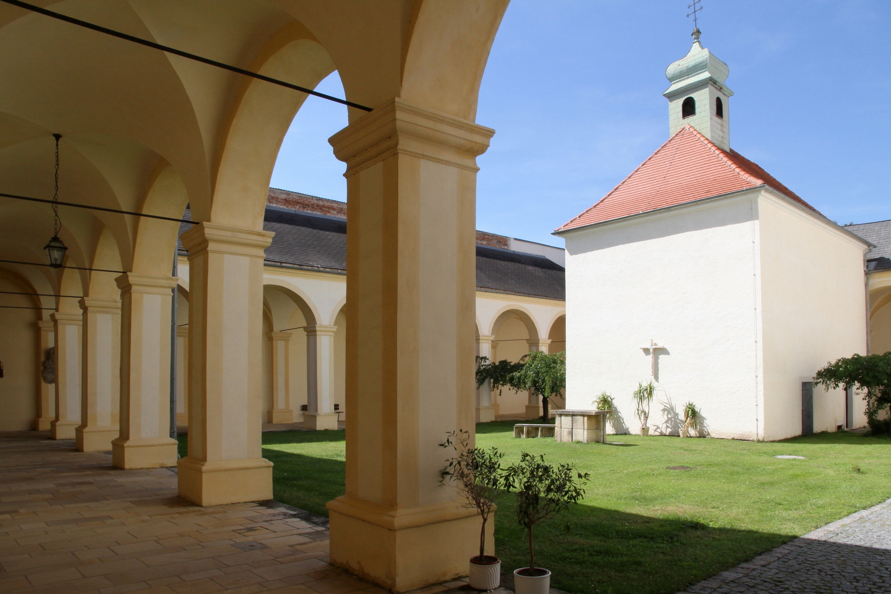 Der Kreuzgang und die Loretto-(Gnaden-)Kapelle des ehemaligen Servitenklosters in der burgenländischen Marktgemeinde Loretto.